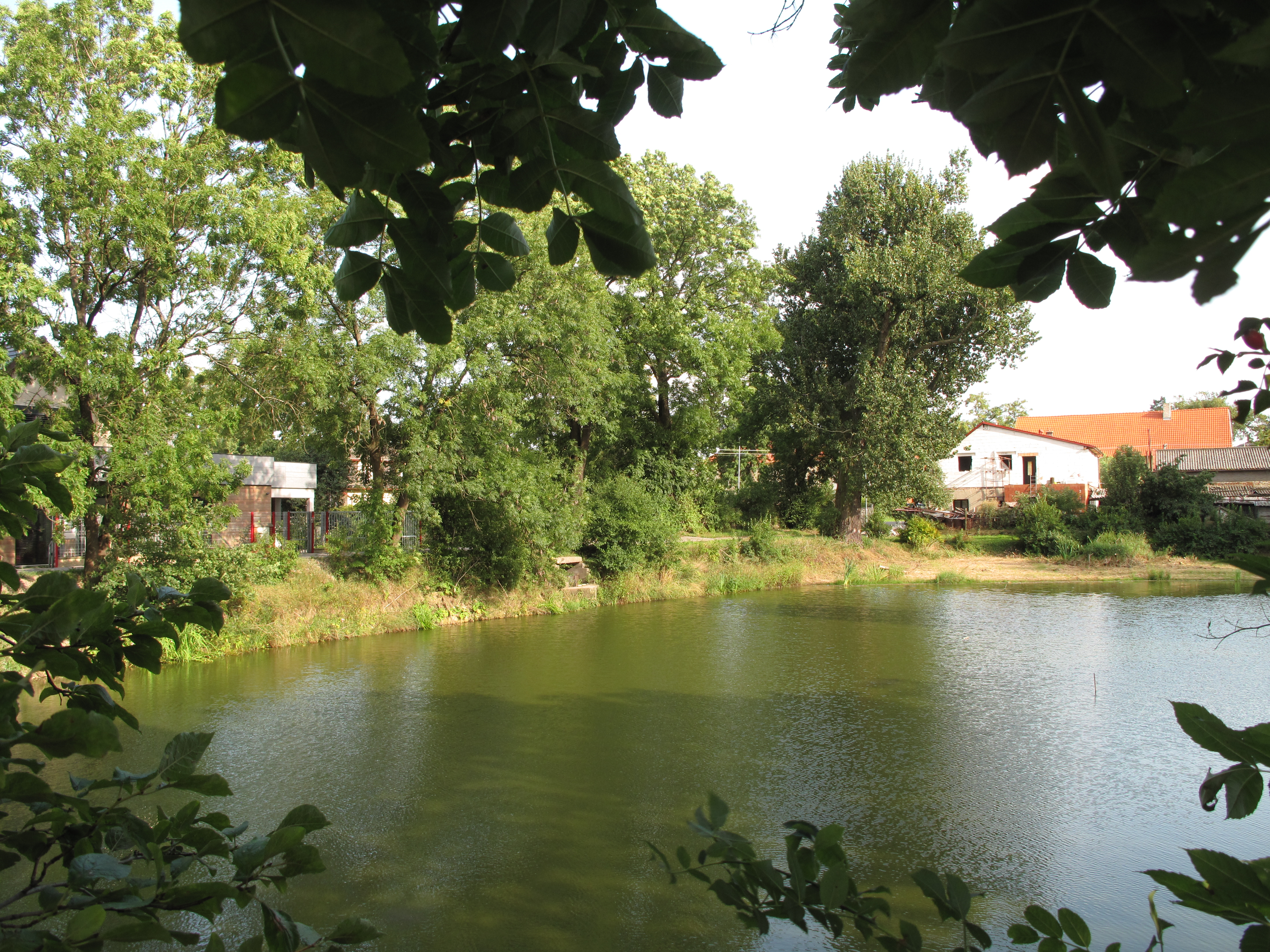 Dehtárský rybník. Okres Praha-východ, Česká republika.